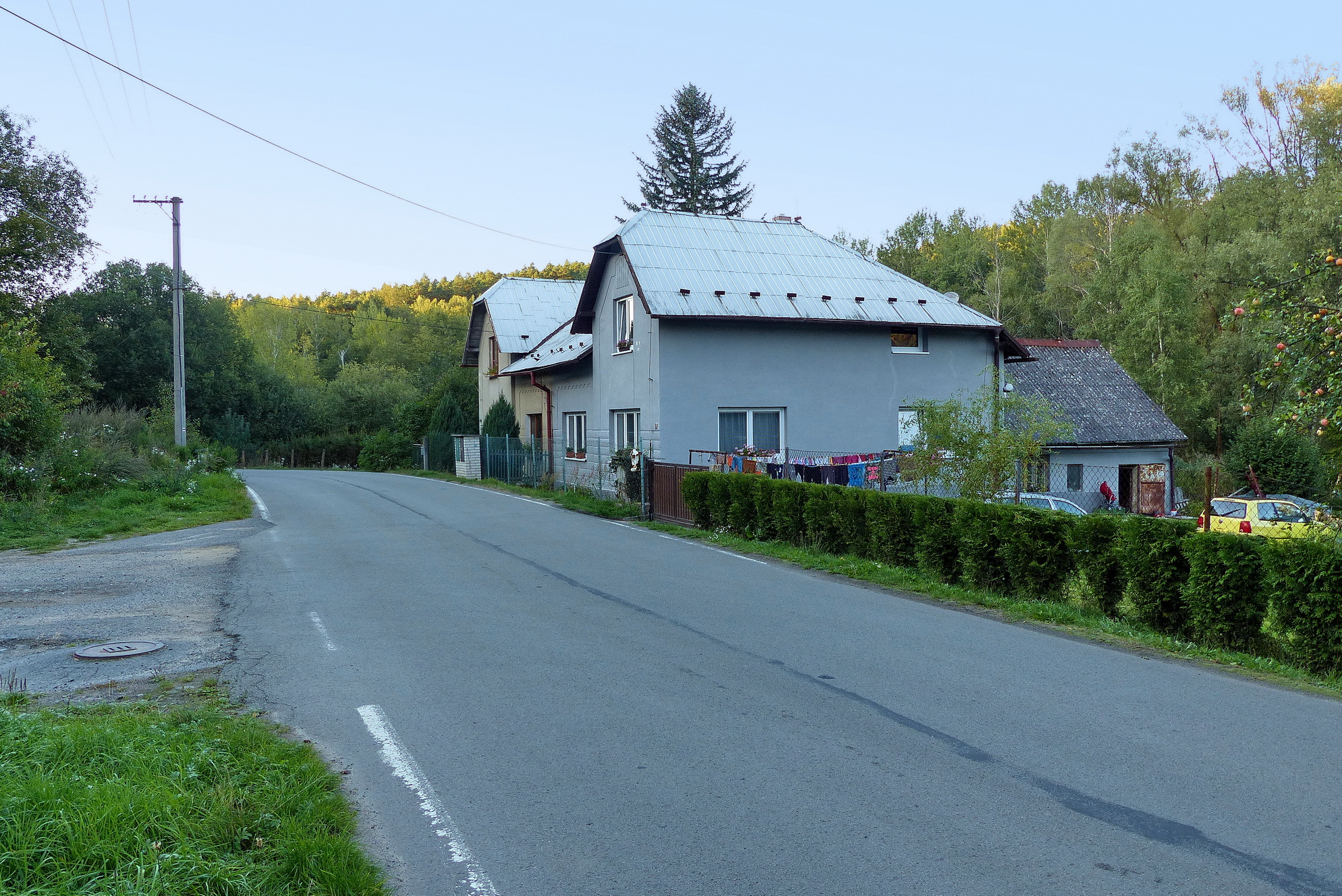 Dům ve Vrchbělé